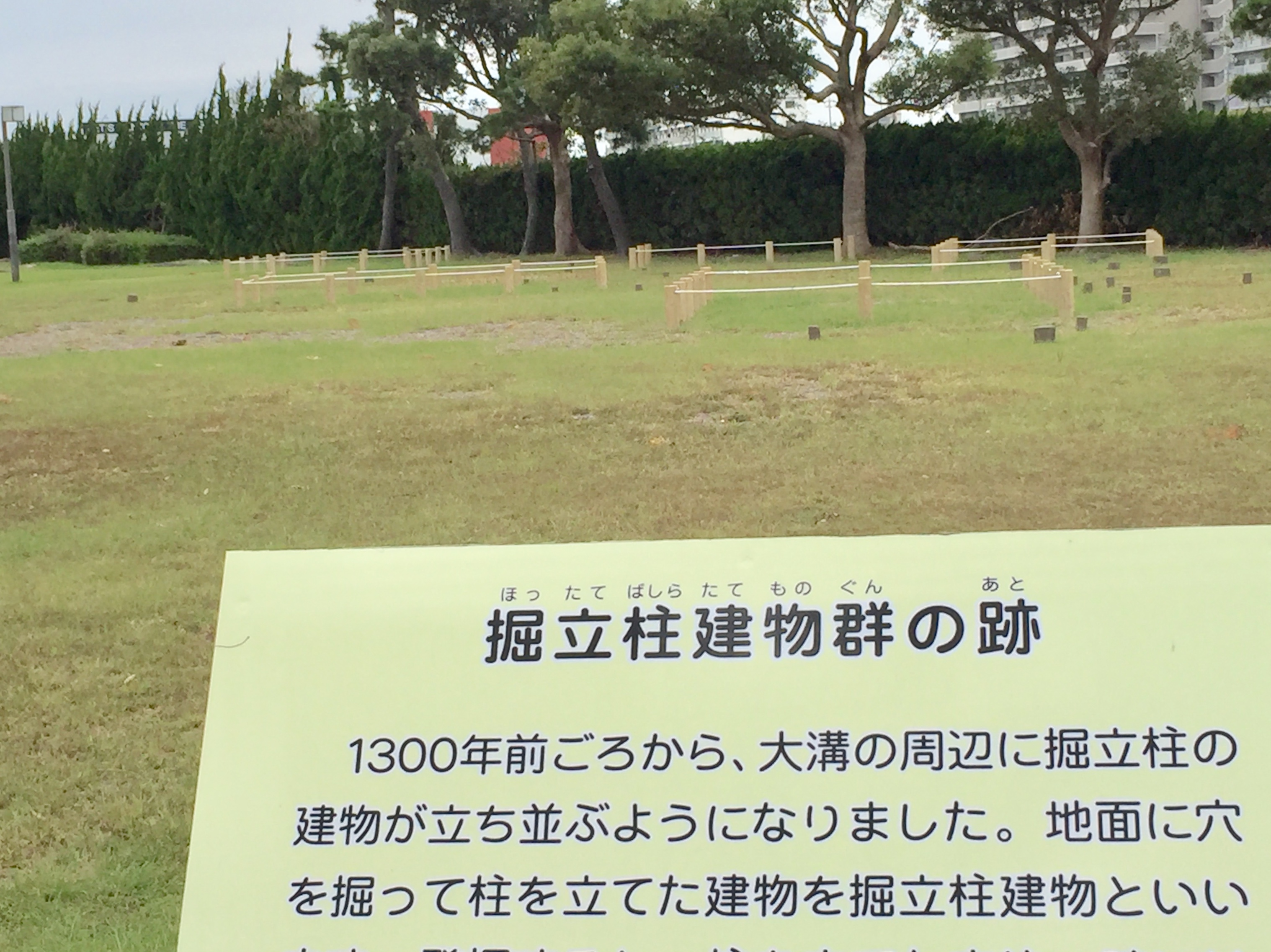 小川に沿うように生活拠点があった。